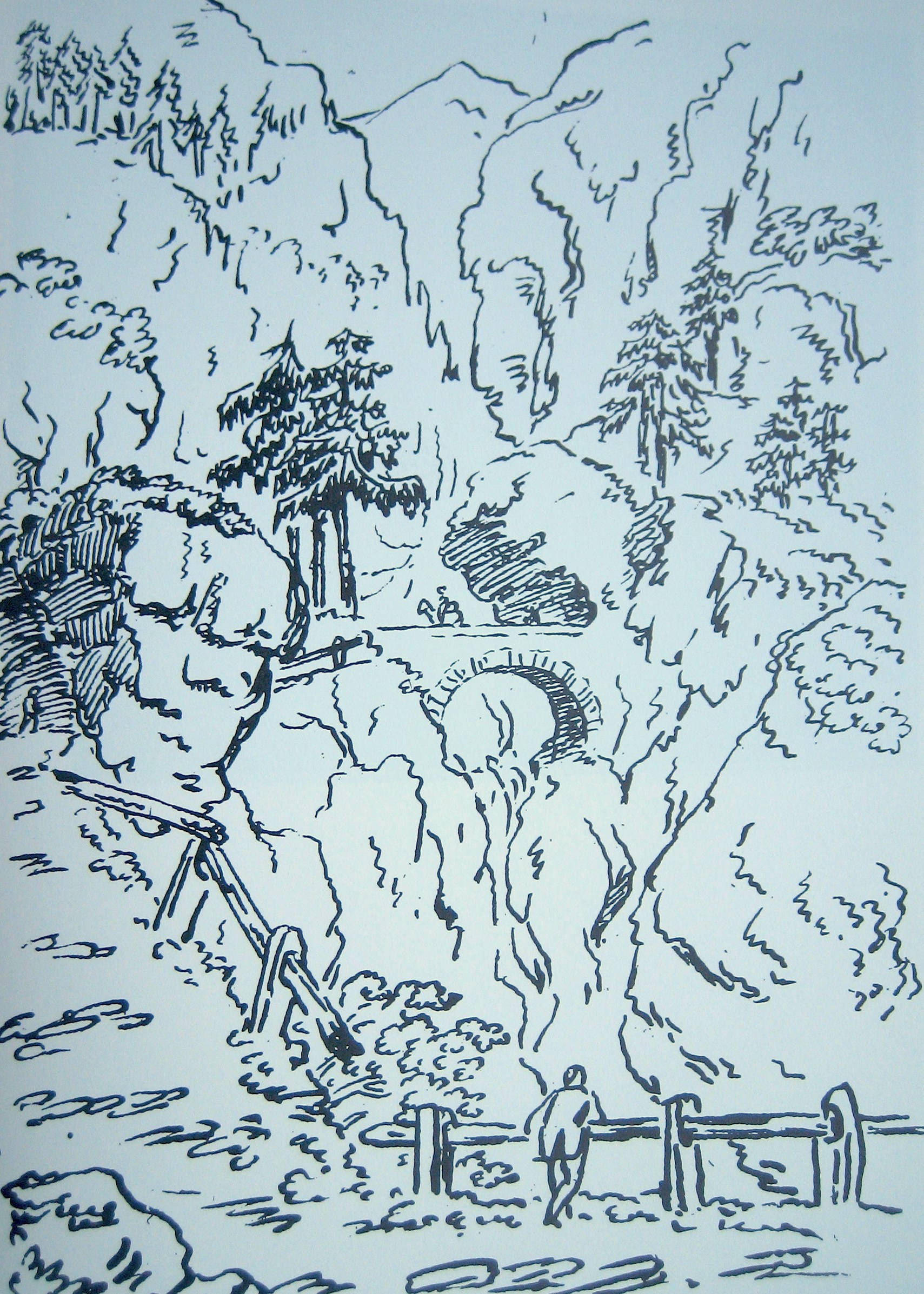 Die Via Mala auf einer Zeichnung von Goethe, 194 x 143 mm, Bleistift und Feder mit Sepia, 1. Juni 1788